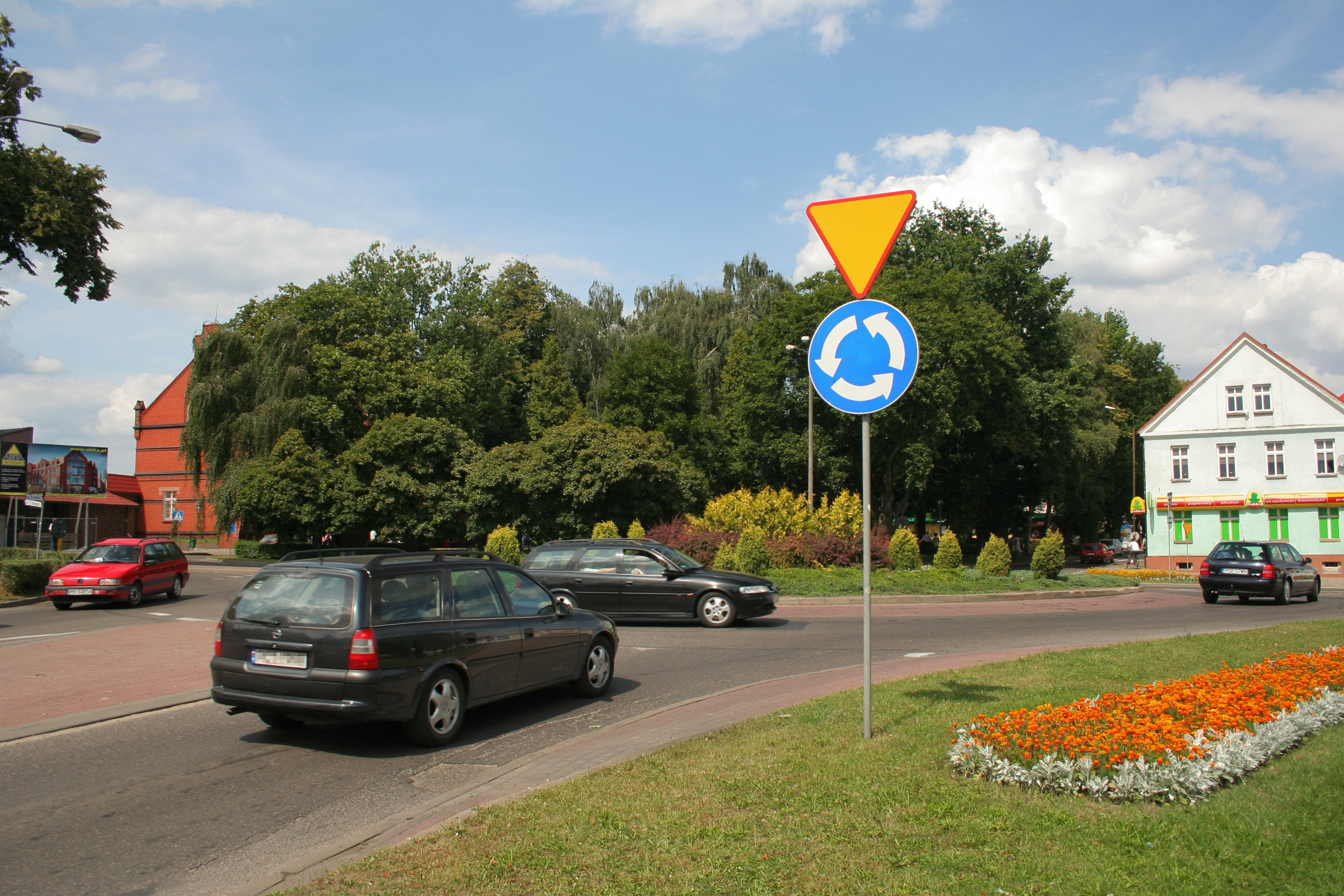 Rondo Solidarności w Trzciance, część DW 178 i DW 180.